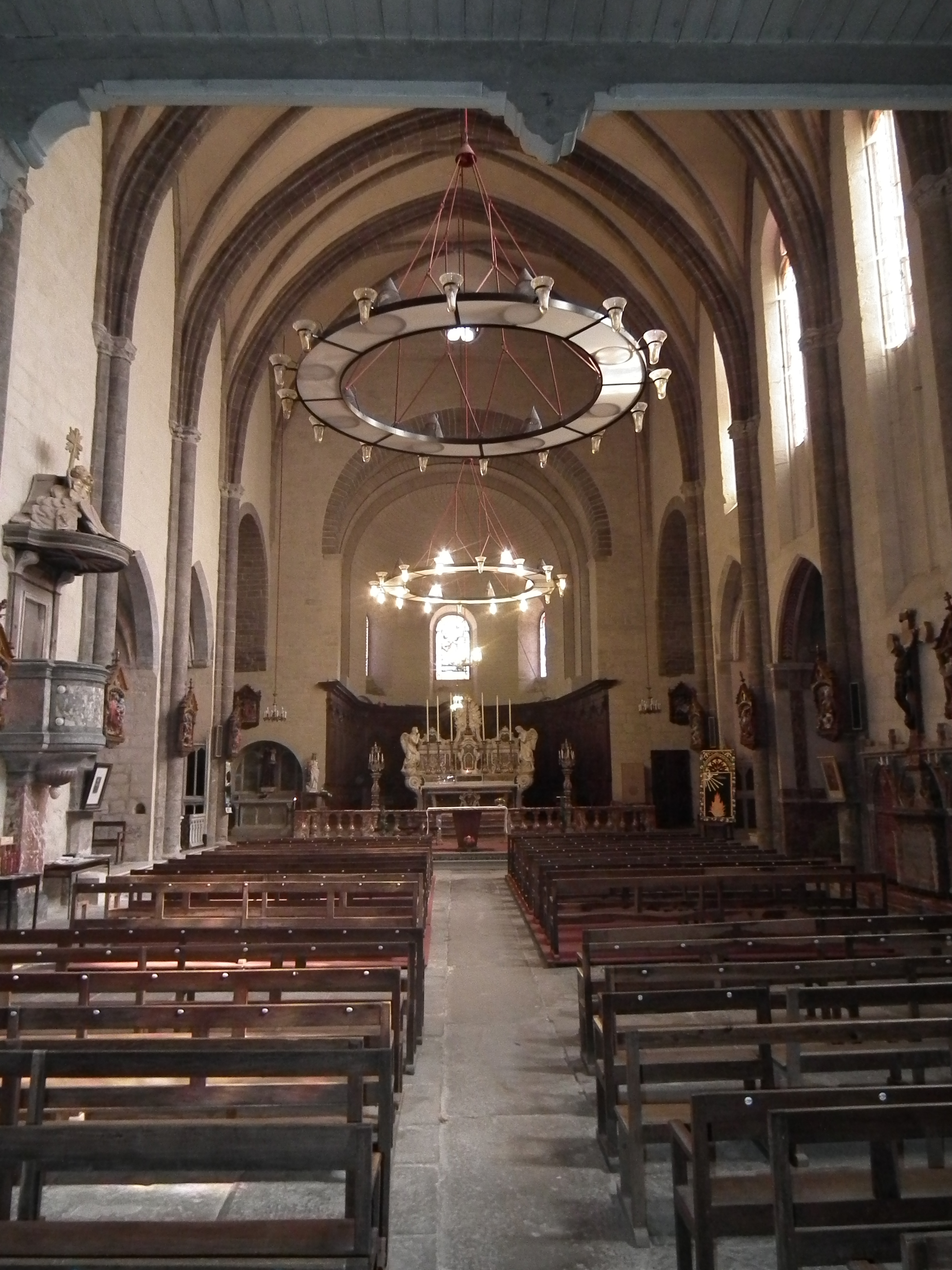 Localisation: 43°19'33"N 2°31'37"E This building is en partie classé, en partie inscrit au titre des Monuments Historiques. .